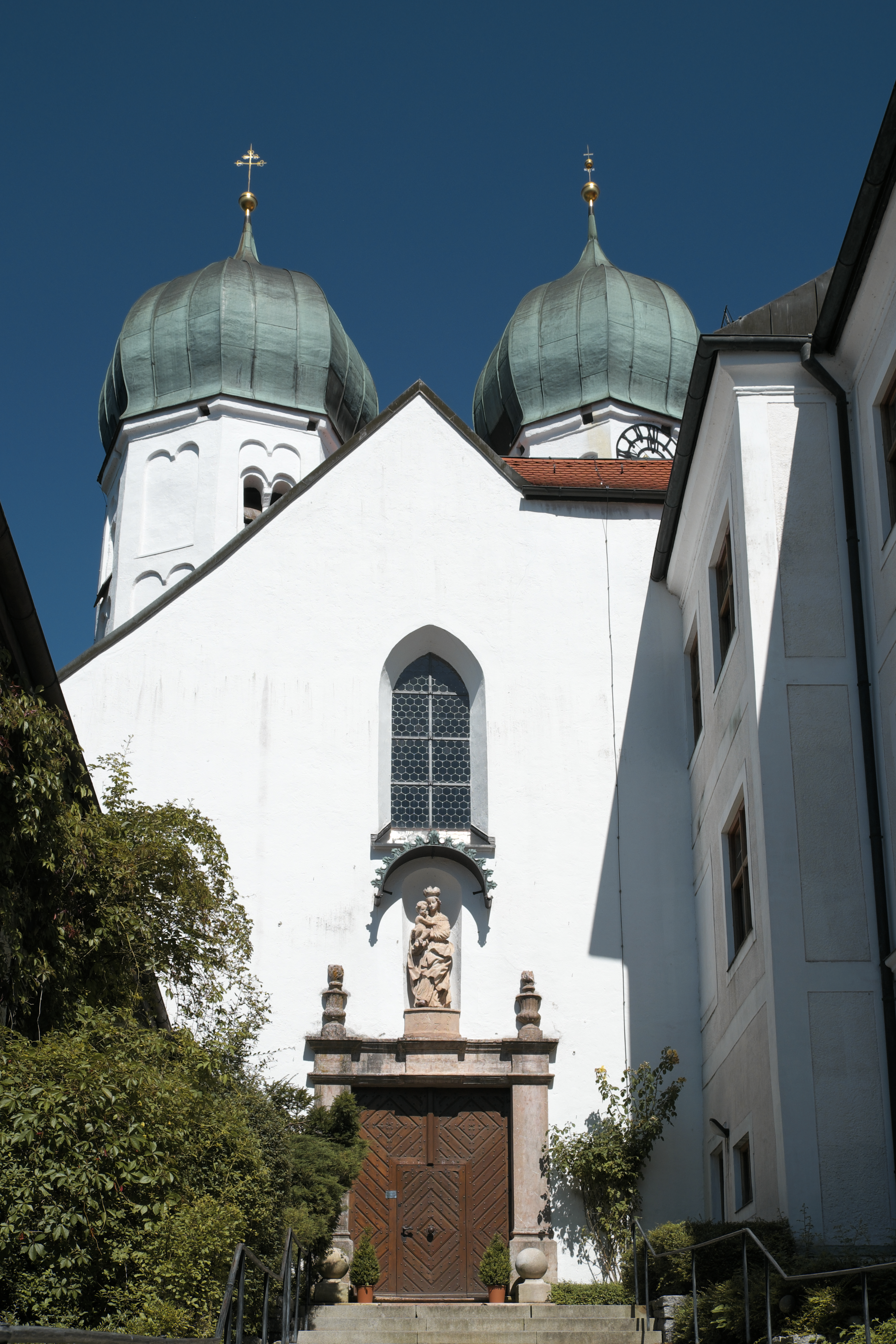 Katholische Pfarrkirche, ehemalige Benediktinerklosterkirche St. Lambert in Klosterseeon, einem Ortsteil von Seeon-Seebruck im Landkreis Traunstein (Bayern/Deutschland), Türme